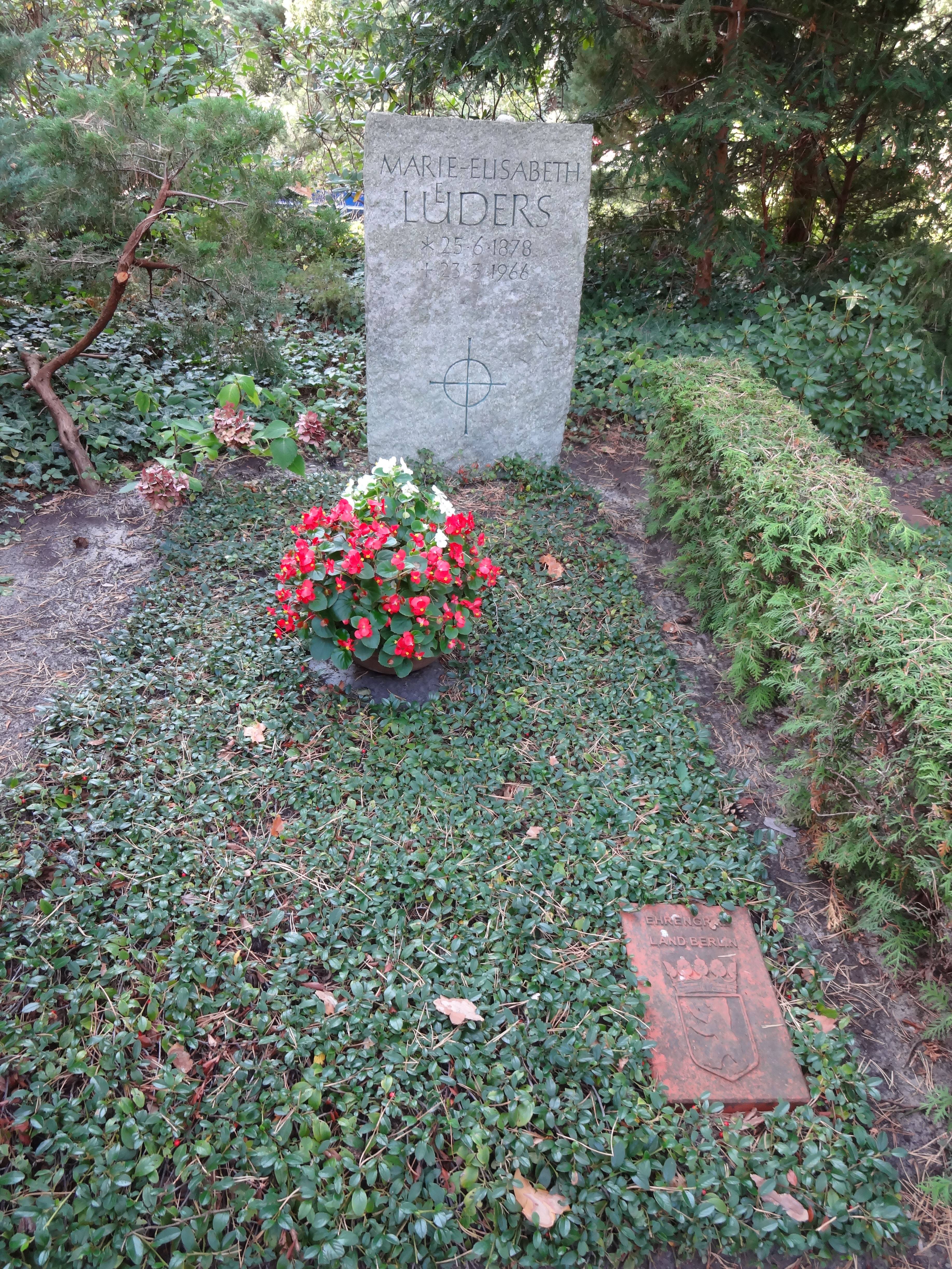 Ehrengrab für Lüders, Marie Elisabeth auf dem Waldfriedhof Dahlem; der Friedhof ist ein Gartendenkmal in BerlinThis is a photograph of an architectural monument.